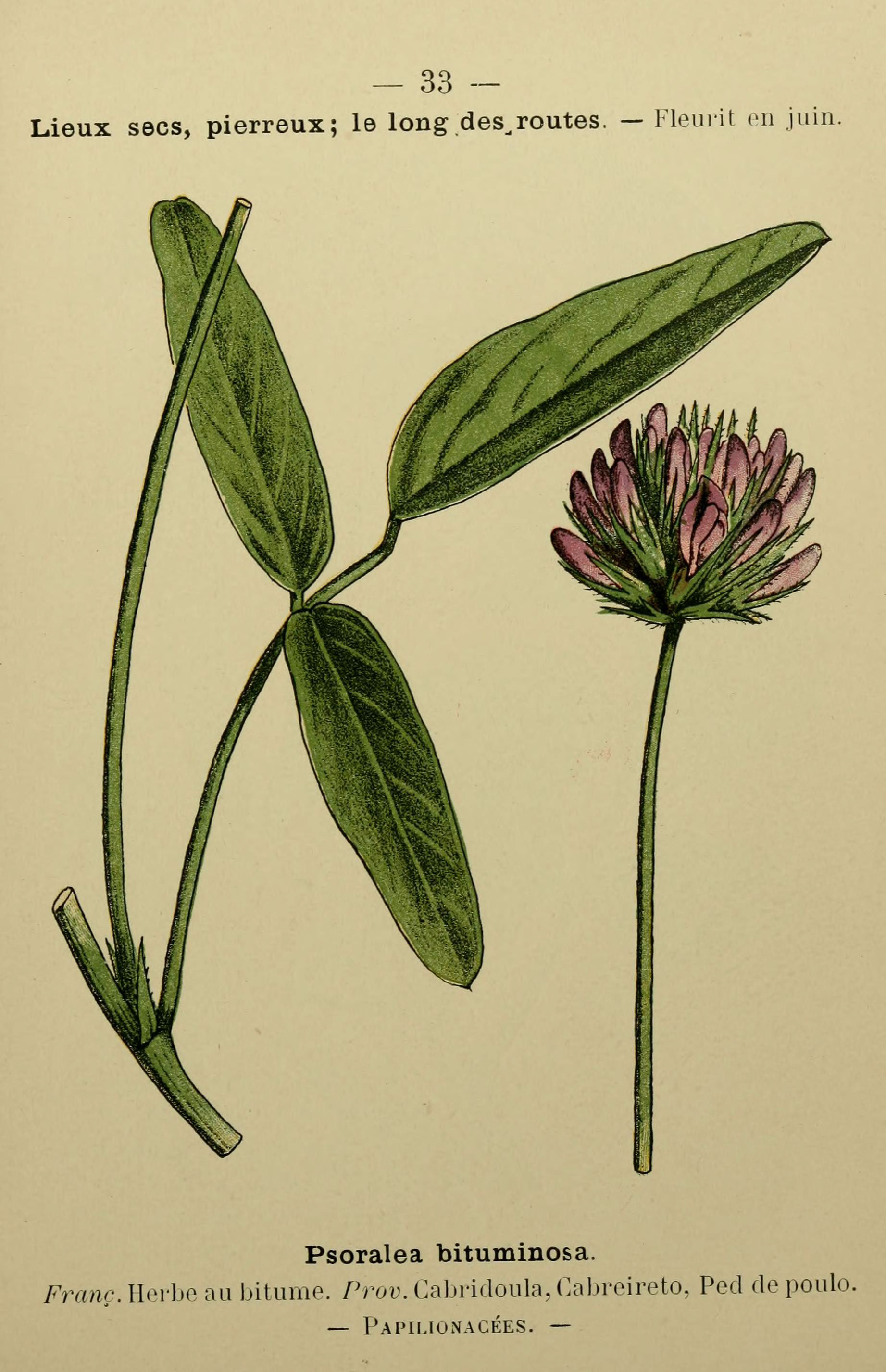 — 33 - Lieux secs, pierreux; le long des^ routes. — Fleurit en juin. Psoralea bituminosa. Franc. Herbe au bitume. Prov. Caln-idoula, Cabreireto, Ped de poulo. — Papii.ionacées. —